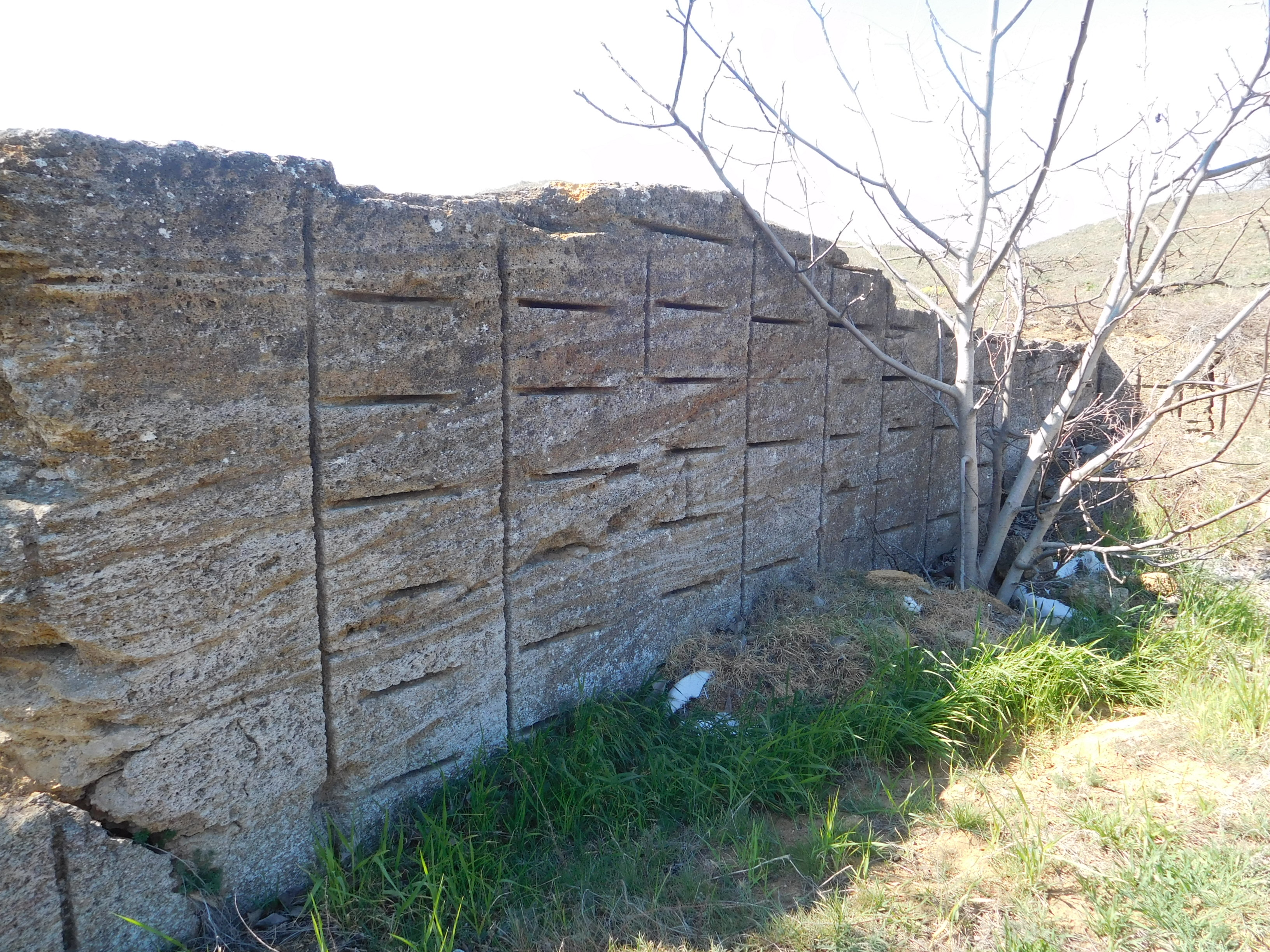 с. Нова Еметівка, Міжлимання, Одеська область